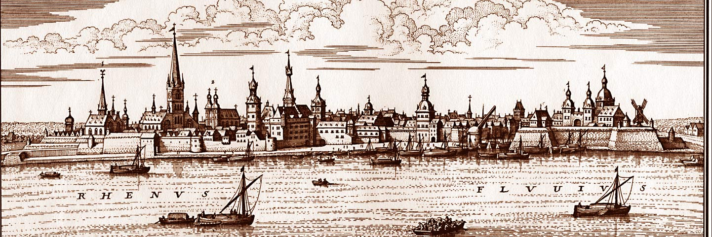 Ansicht der Stadt Düsseldorf (Ansicht von Westen) von Matthäus Merian d. Ä. (1640). Kupferstich, Maße 20,2 × 32,1 cm.